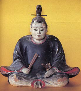 堀田正盛の木像。